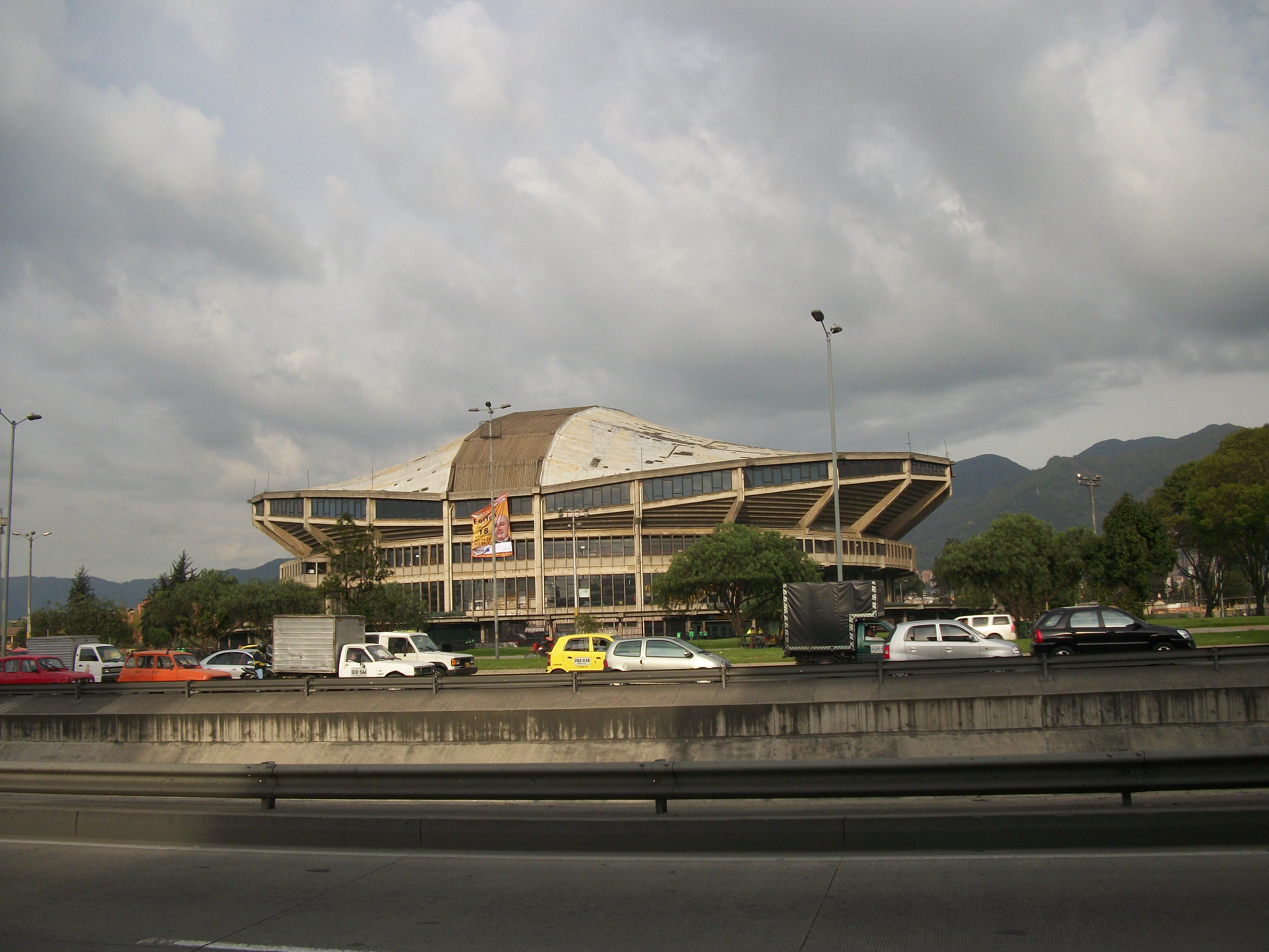 Coliseo cubiero El Camín desde el costado occidental de la av. Treinta.